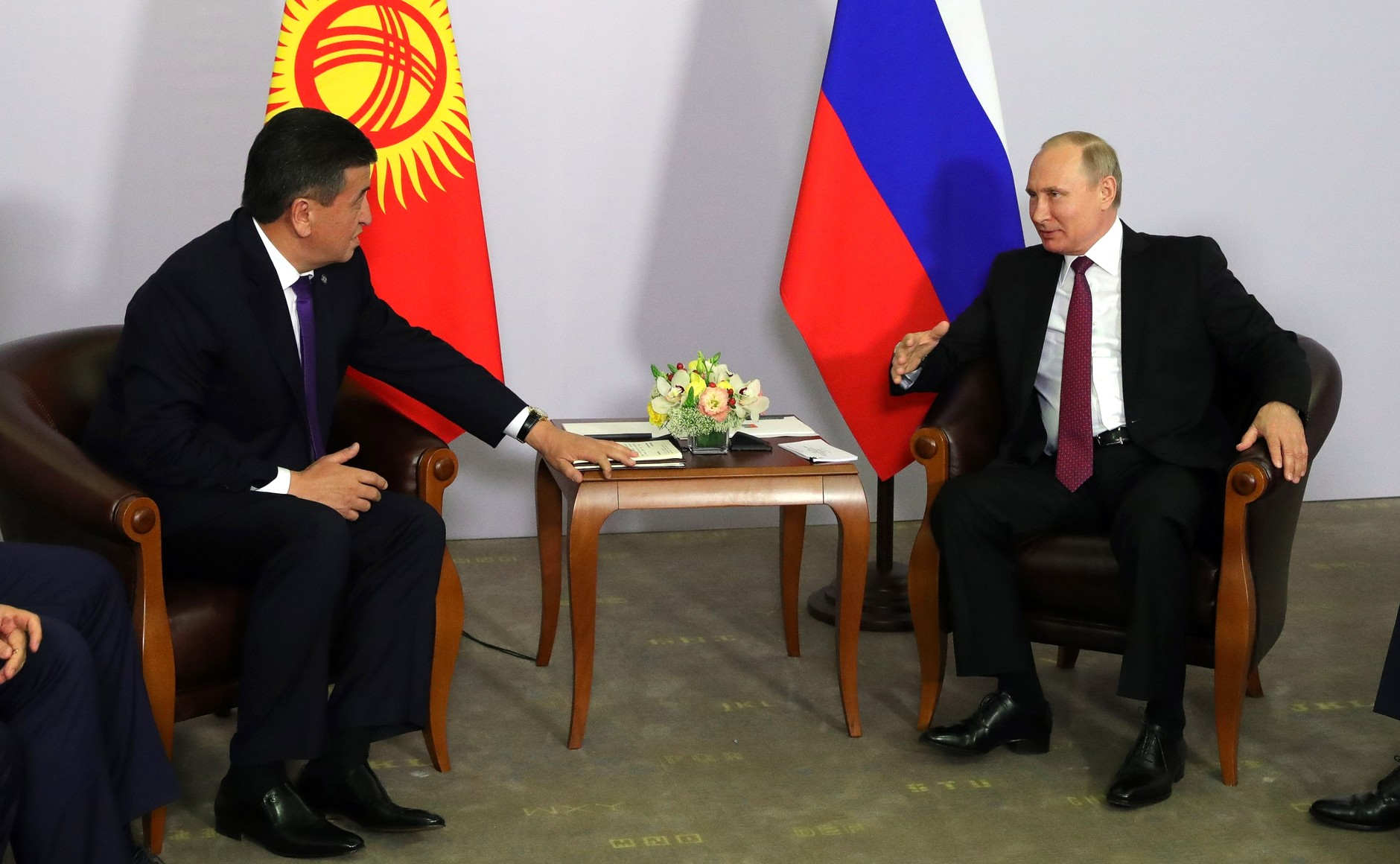 Встреча Президента России Владимира Путина с Президентом Киргизии Сооронбаем Жээнбековым